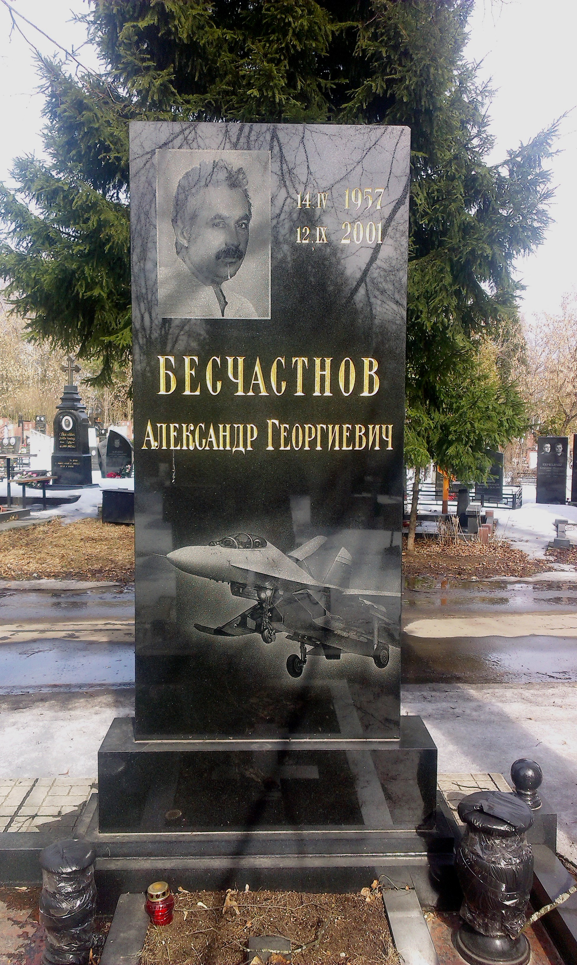 Кладбище села Островцы